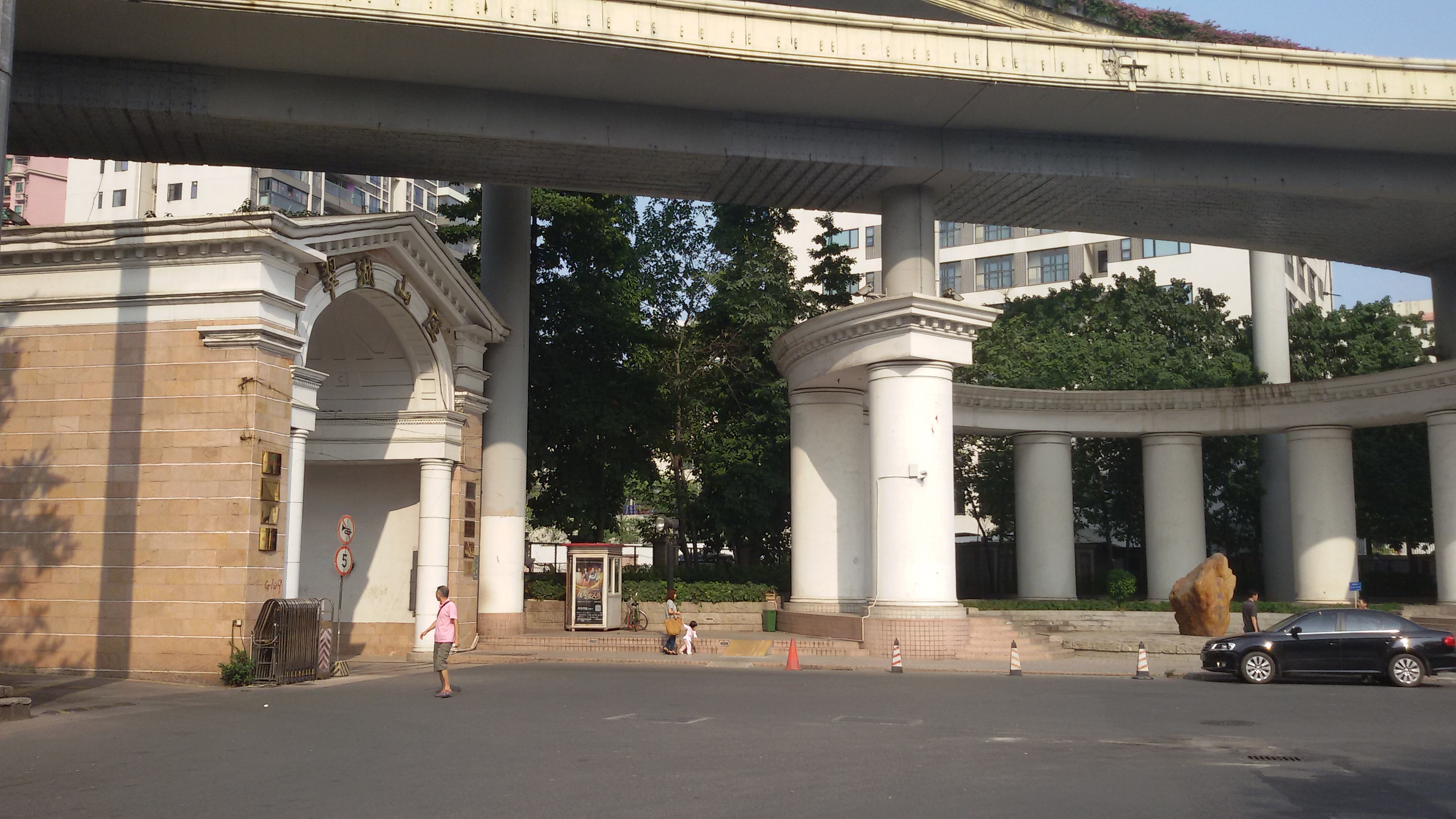 粵語: 翠湖山莊